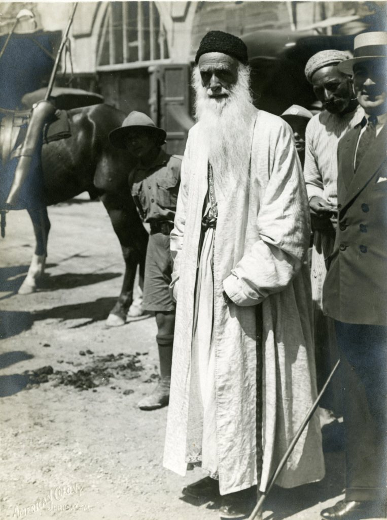 הרב אברהם אמינוף, הרב הראשי של העדה הבוכרית